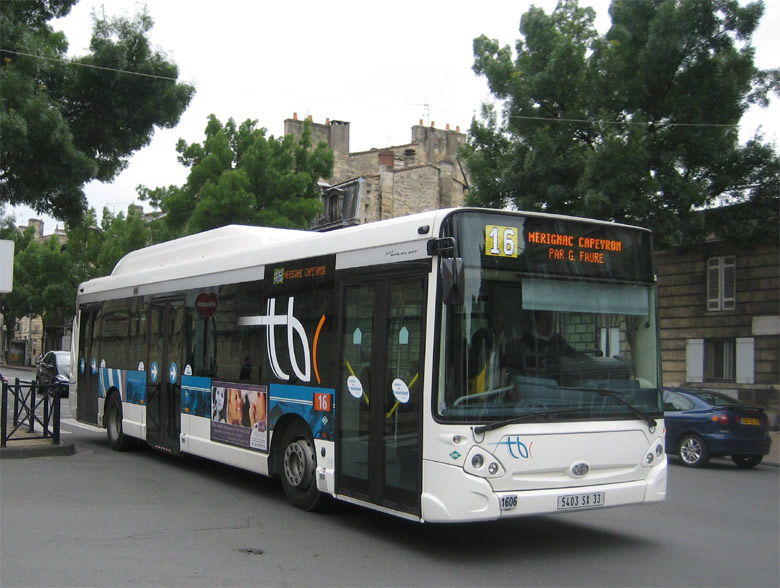 Photo d'un bus du réseau TBC de Bordeaux - Aquitaine - France